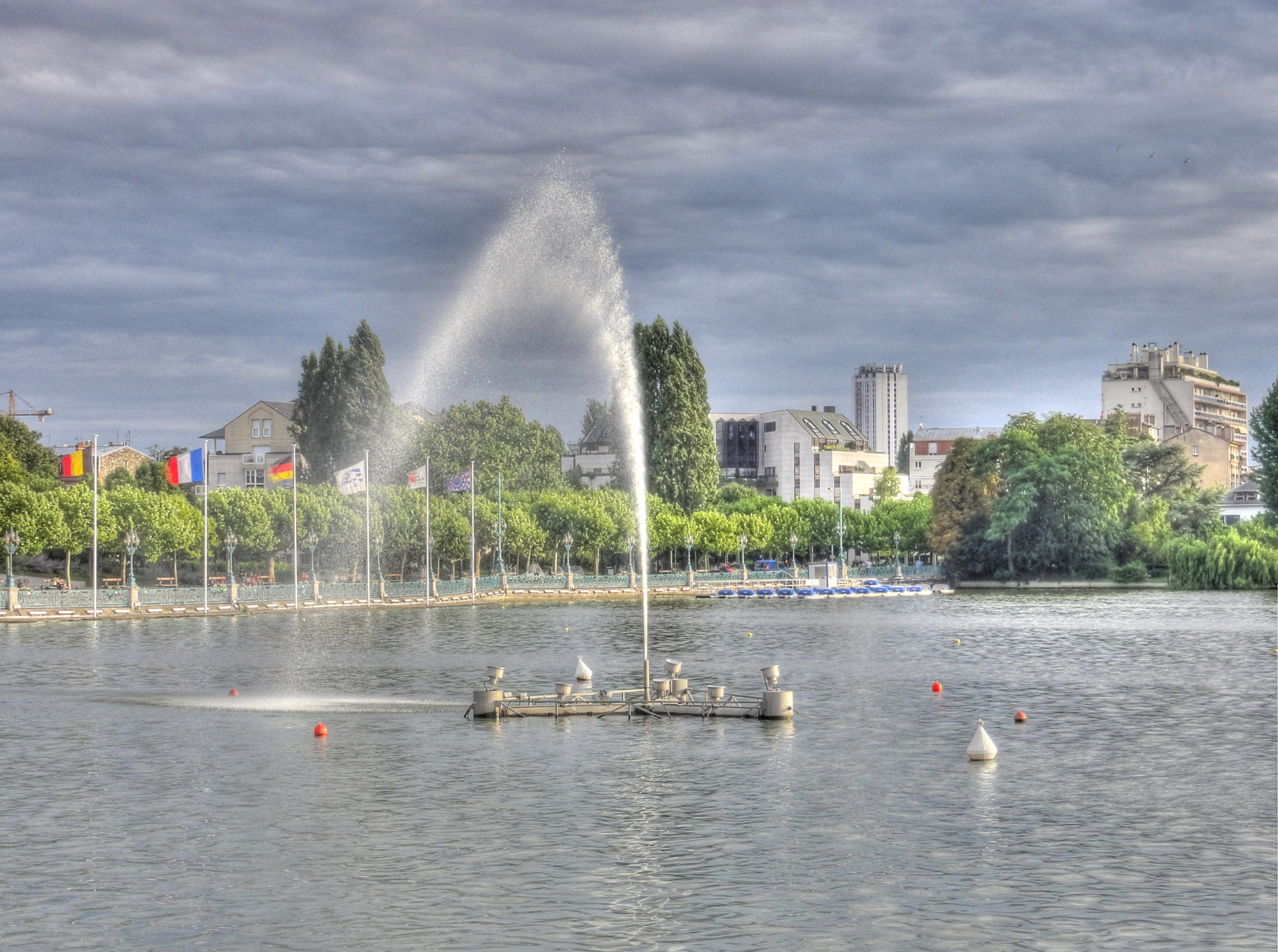 Le jet d'eau et la jetée du lac d'Enghien, Val-d'Oise, France. Photo HDR.